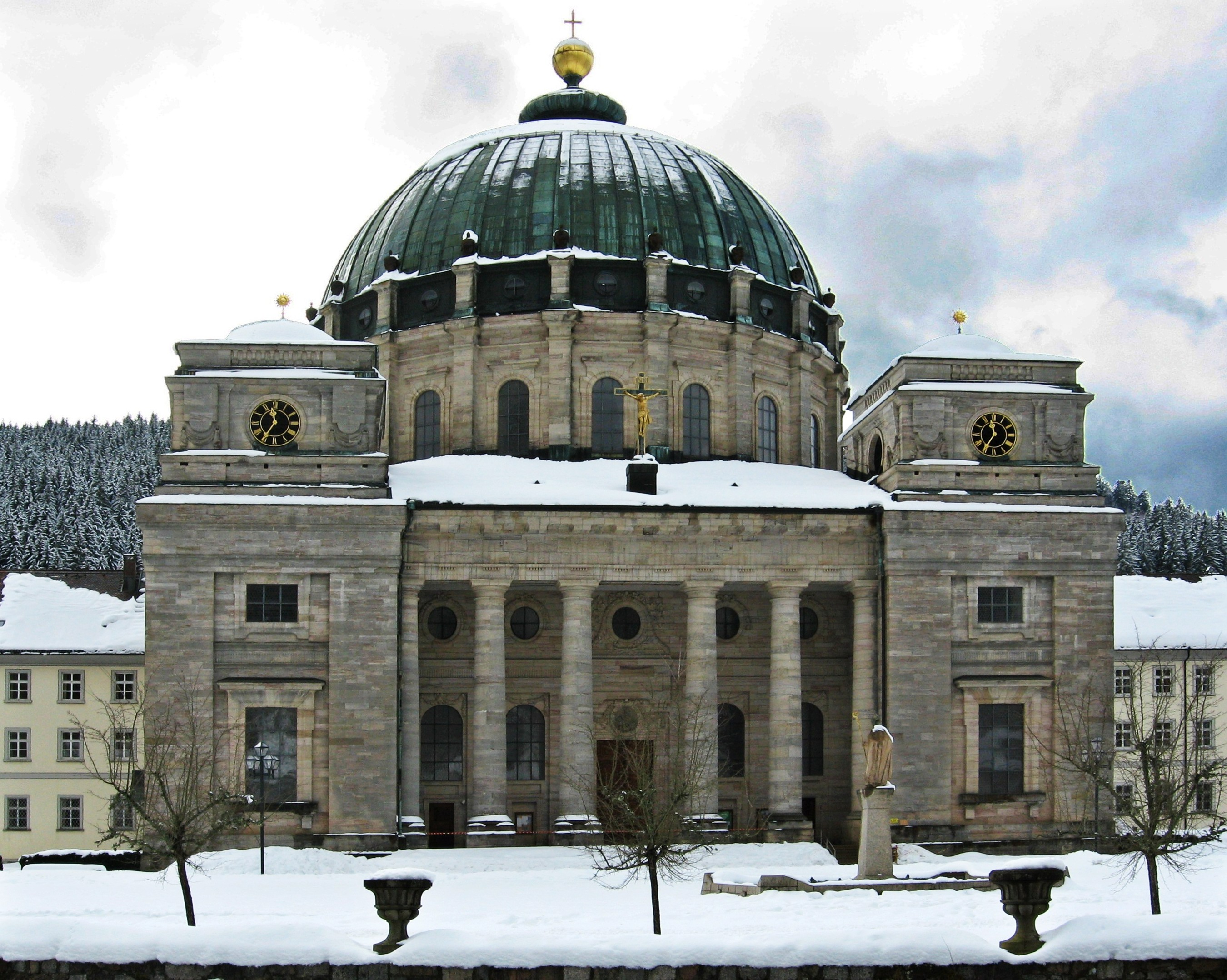 Sankt Blasien Schwarzwald